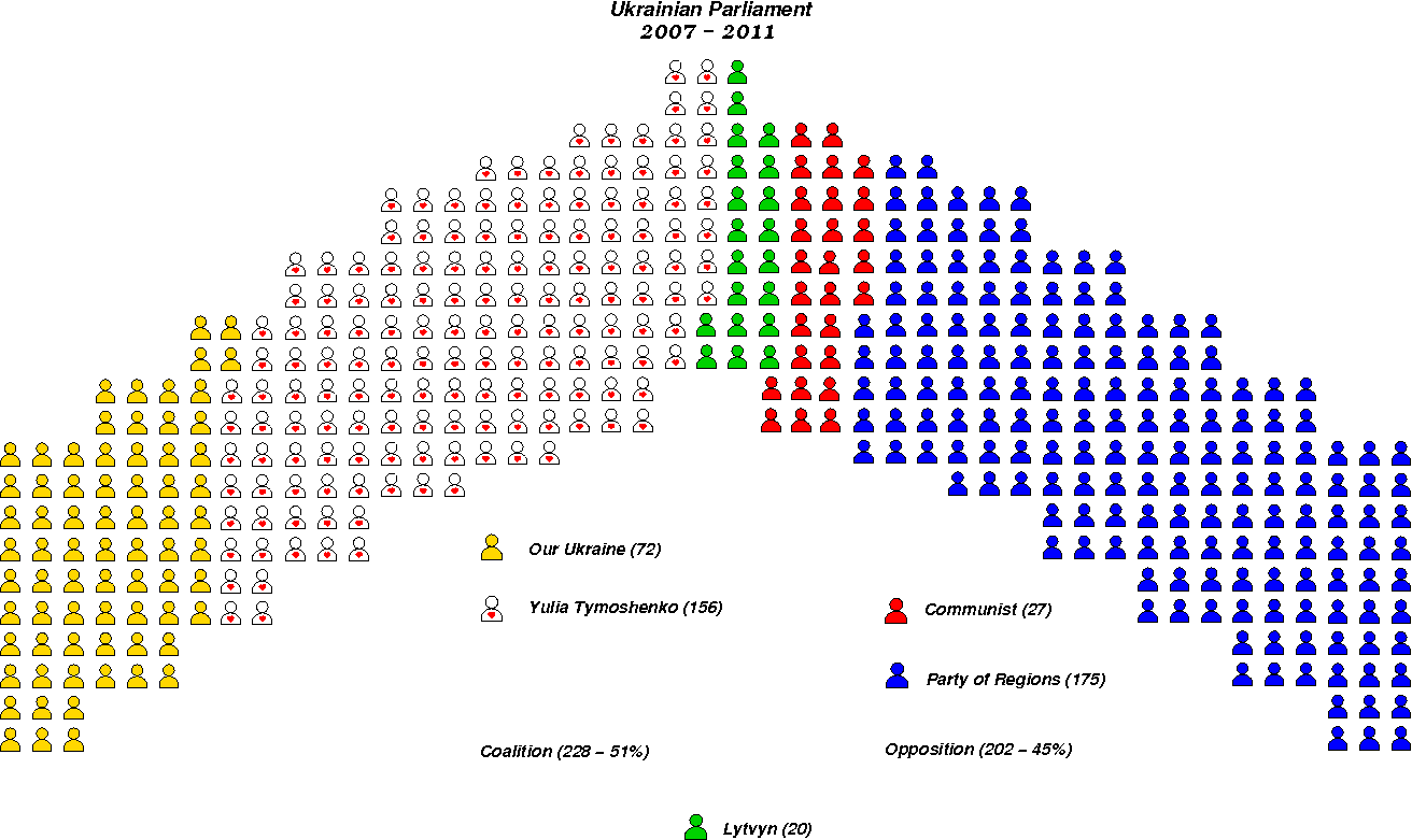 Parlament 2007 -2011